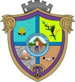 El Escudo del Municipio de Ciudad Manuel Doblado, Guanajuato, México.